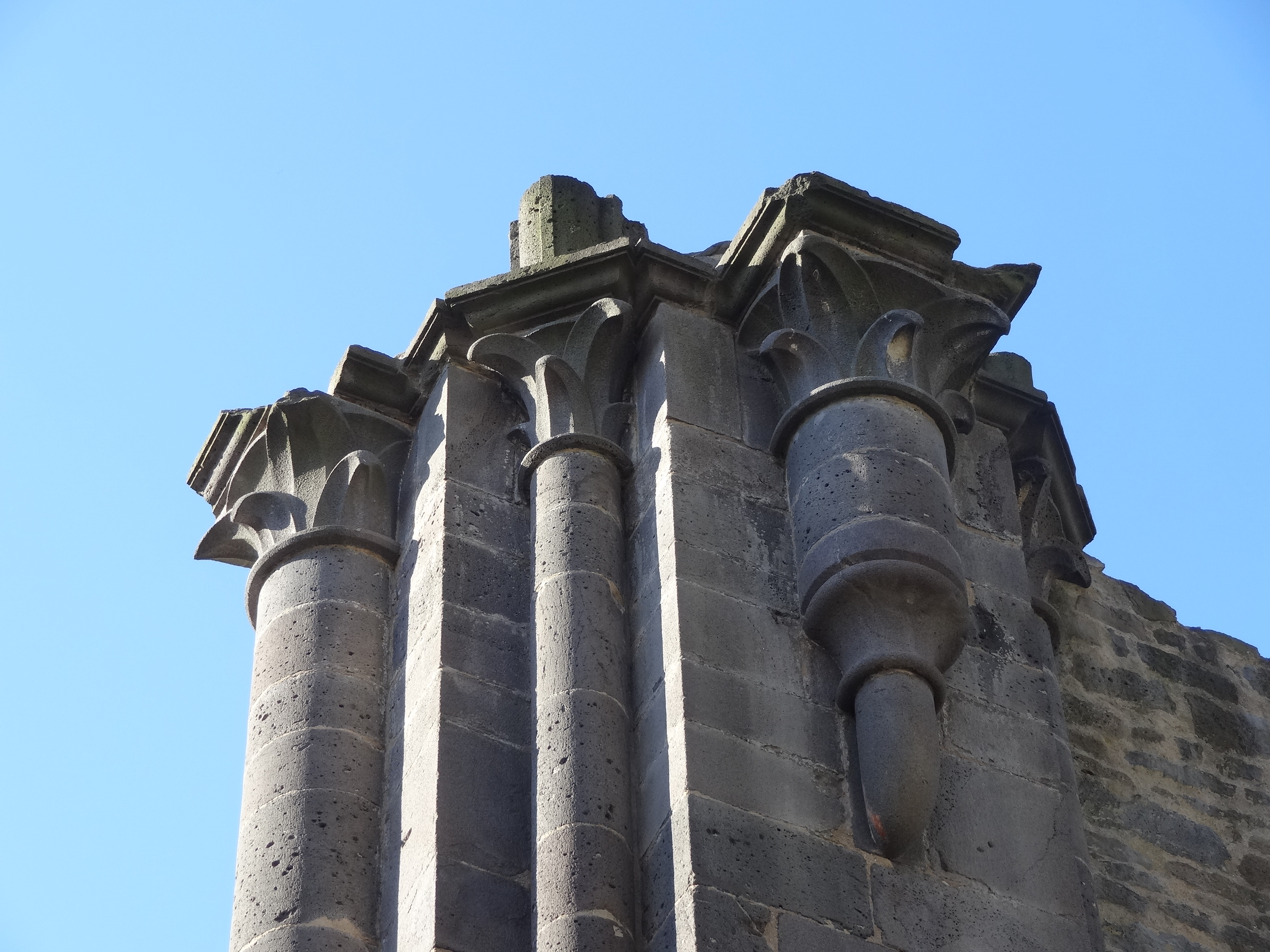 Kloster Arnsburg (Klosterkirche)